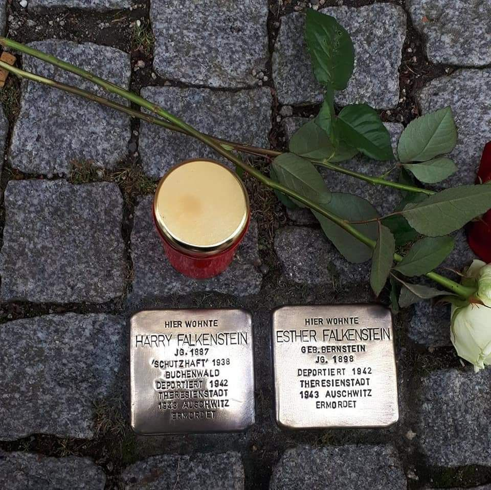 Stolpersteine im Gedenken an Familie Falkenstein in Pößneck